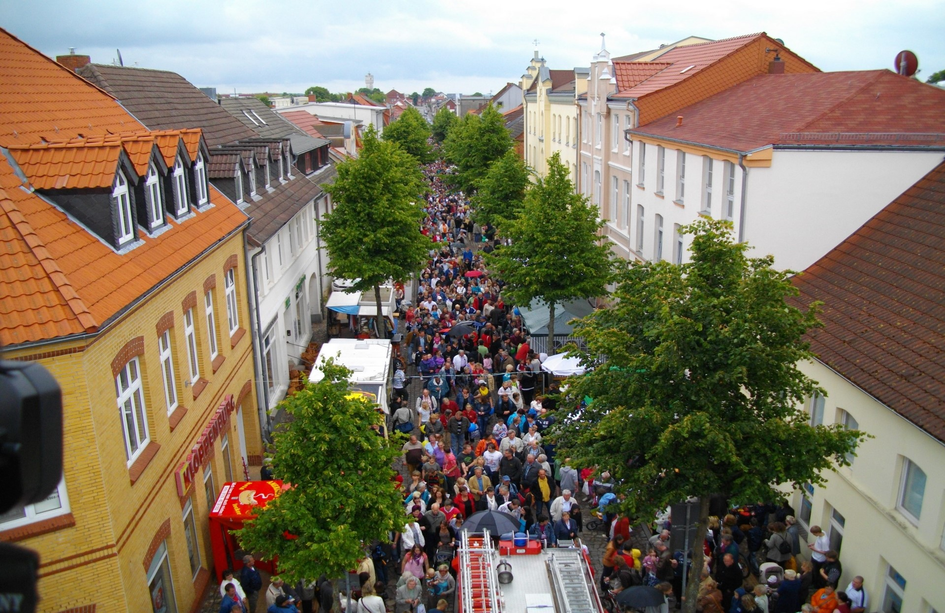 Stadtumzug Grevesmühlen